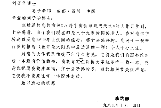 中文（台灣）: 李約瑟寫信給劉子華